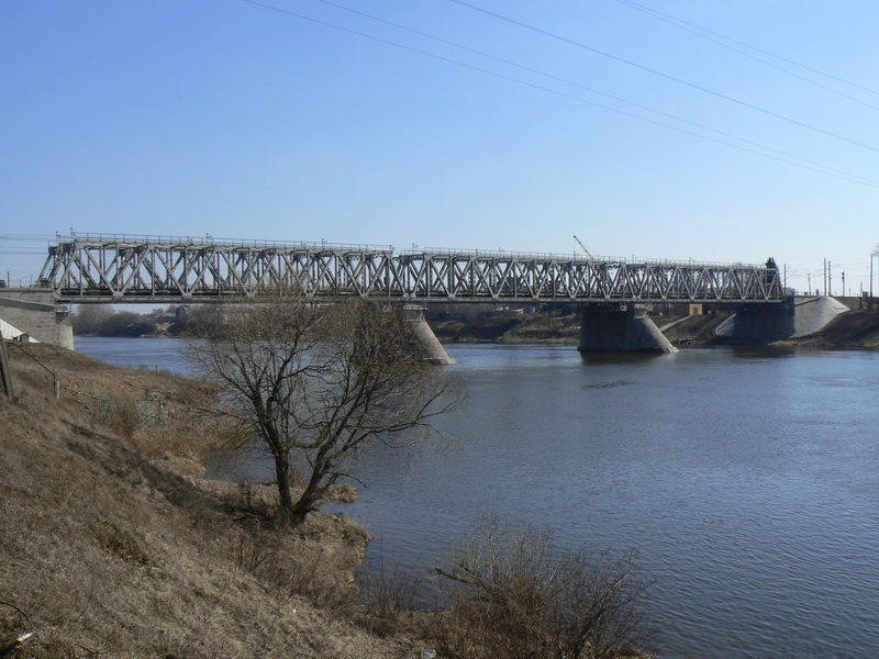 Железнодорожный мост в Твери